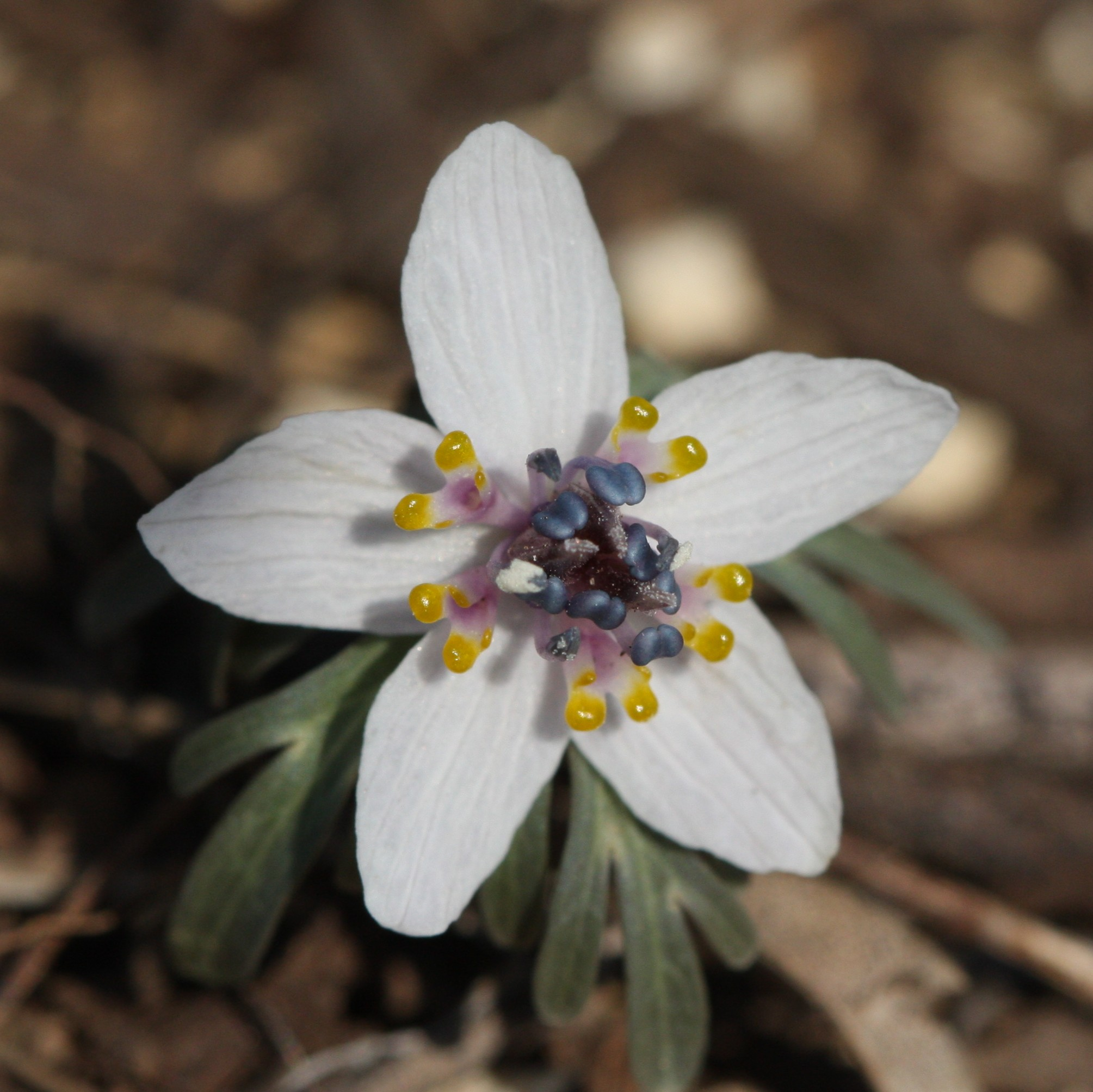 セツブンソウ (Eranthis pinnatifida, syn. Shibateranthis pinnatifida) 花びらの先が2裂し、裂片の先端が蜜腺になっている。